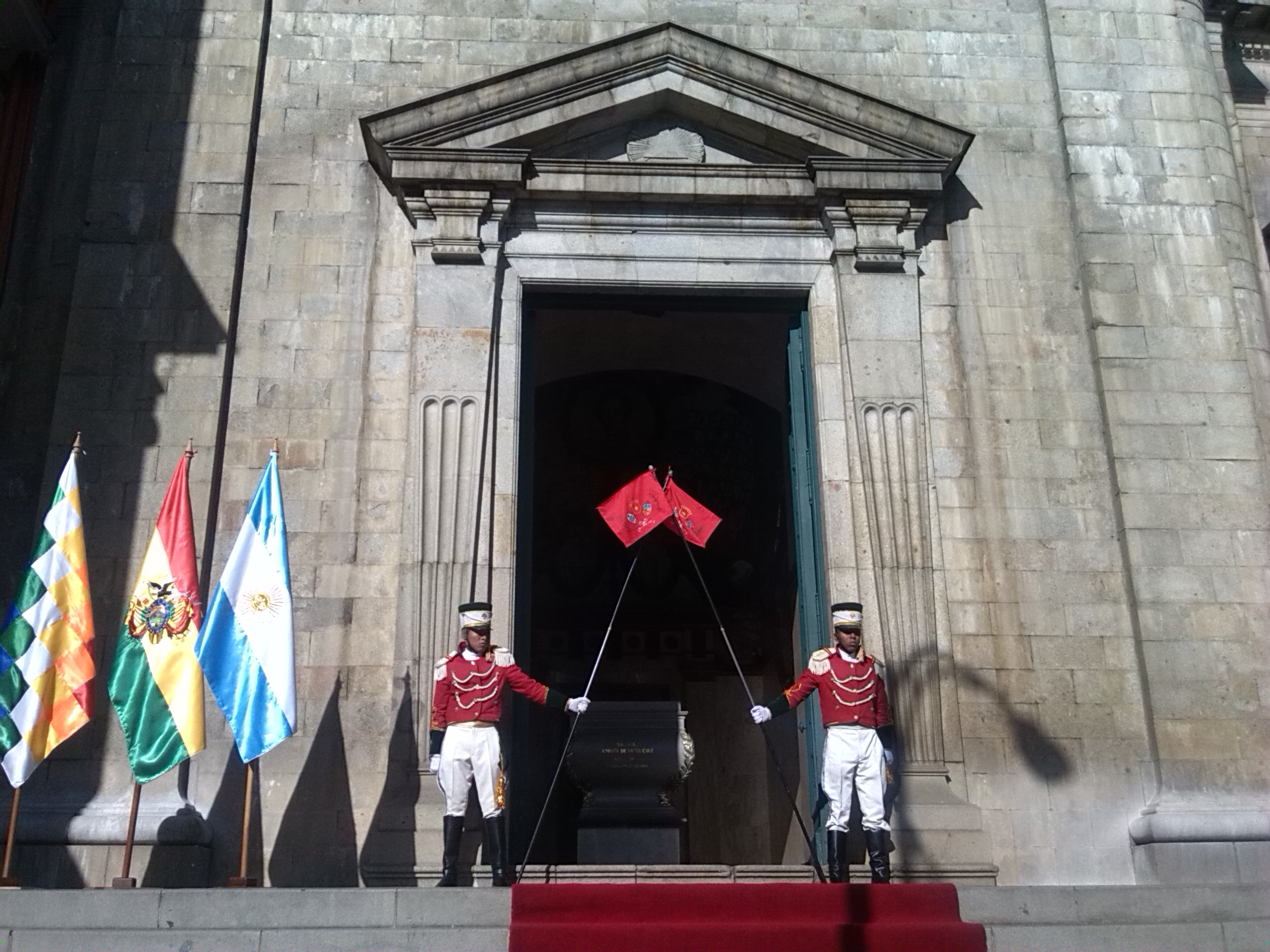 Día de independencia de Argentina